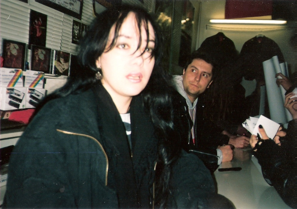 Anja Orthodox - spotkanie z fanami, Lublin 1994